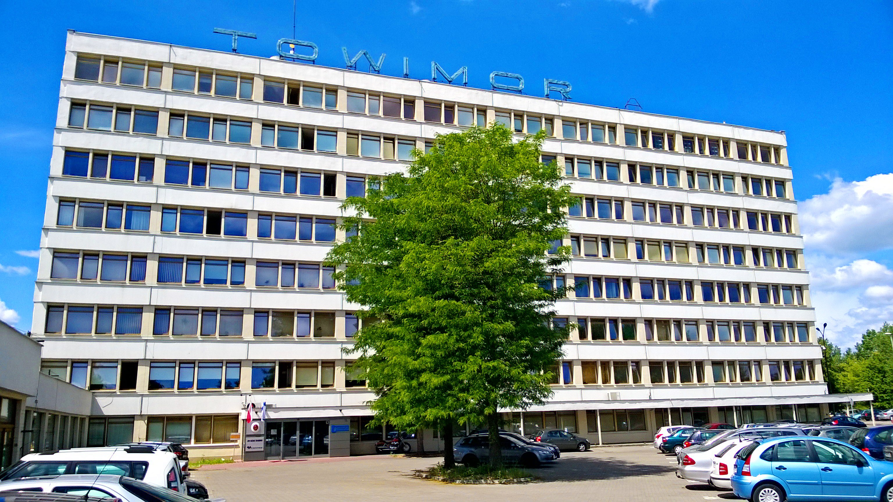 Towimor w Toruniu